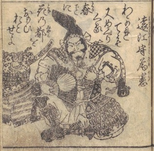 藤原為憲